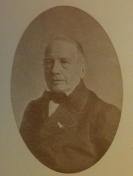 Barthélemy Bompard, maire de Metz, 1832-1839